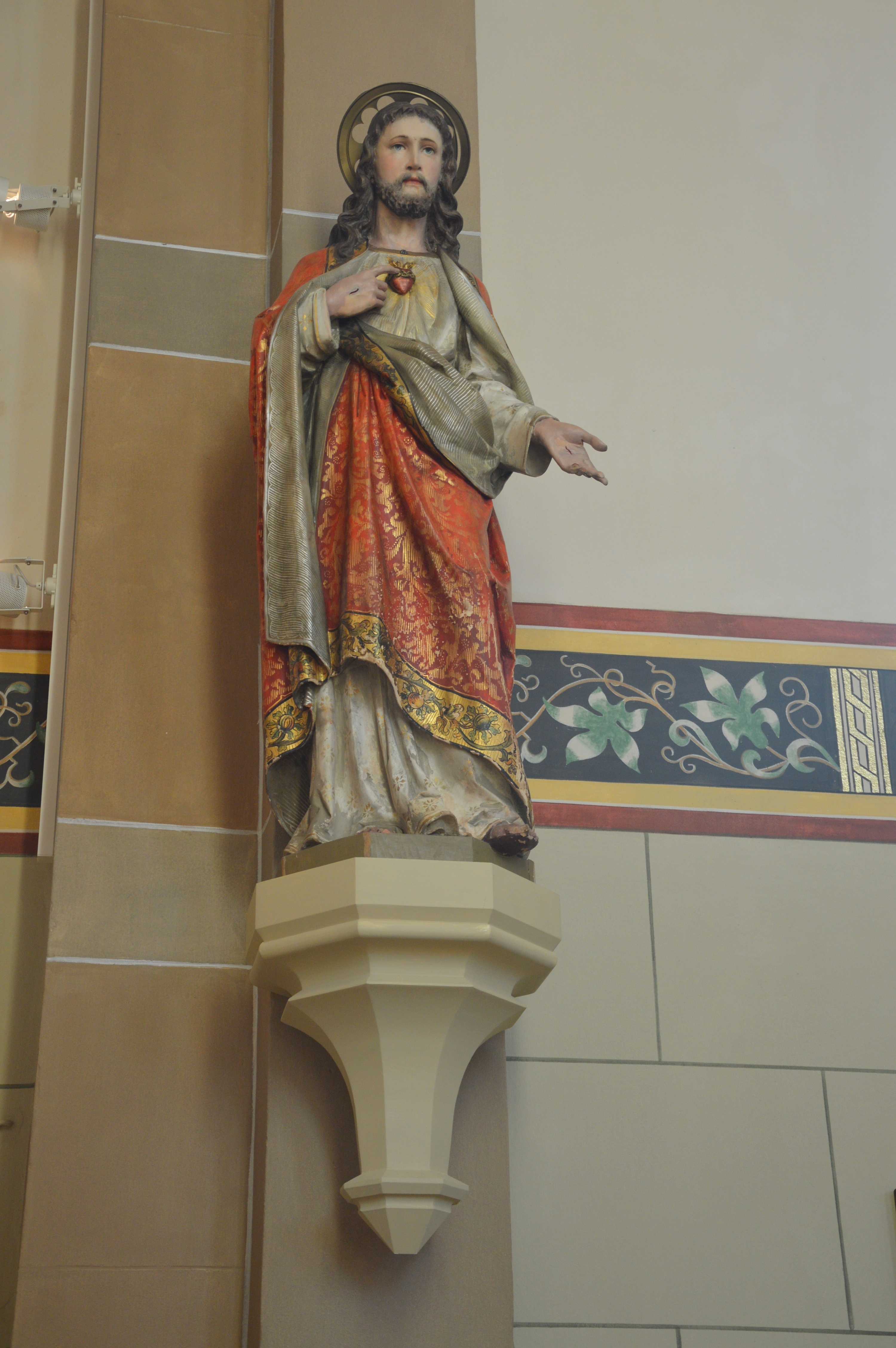 Herz Jesu Statue St. Matthäus Bad Sobernheim